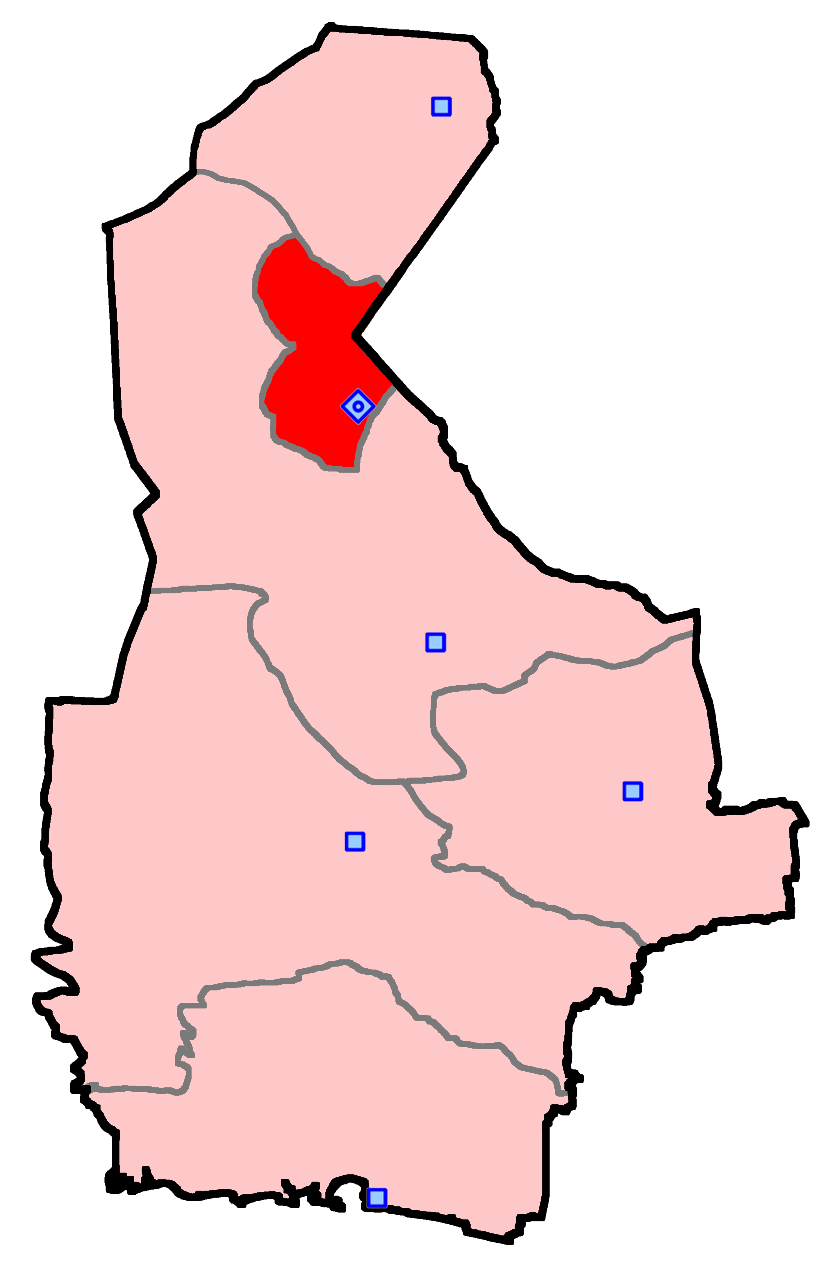 حوزه‌ زاهدان برای انتخابات مجلس شورای اسلامی